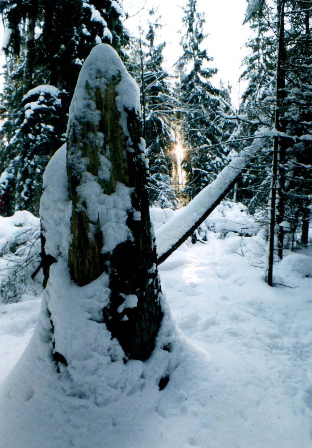 Autor: Adrian Grzegorz